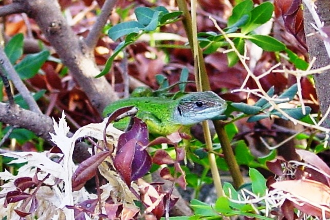 Lacerta bilineata Riserva dello Zingaro, Sicily